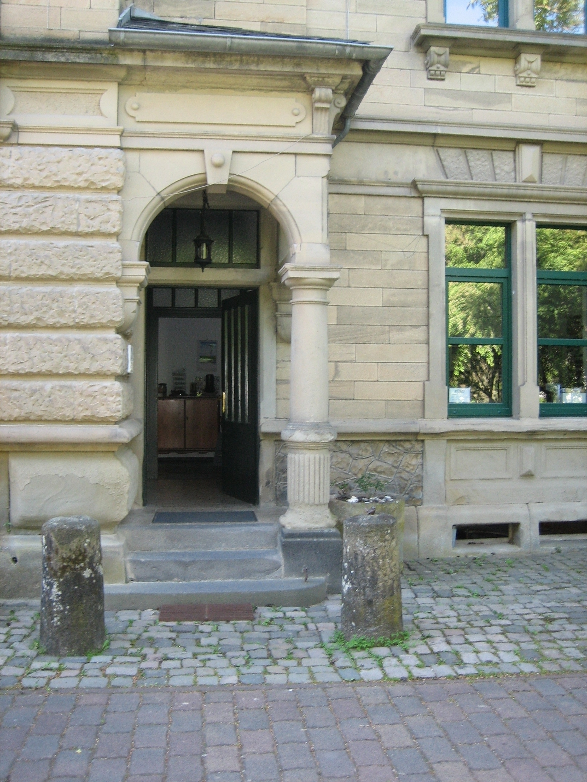 Eingang des ehemaligen Bahnhof Lauterecken